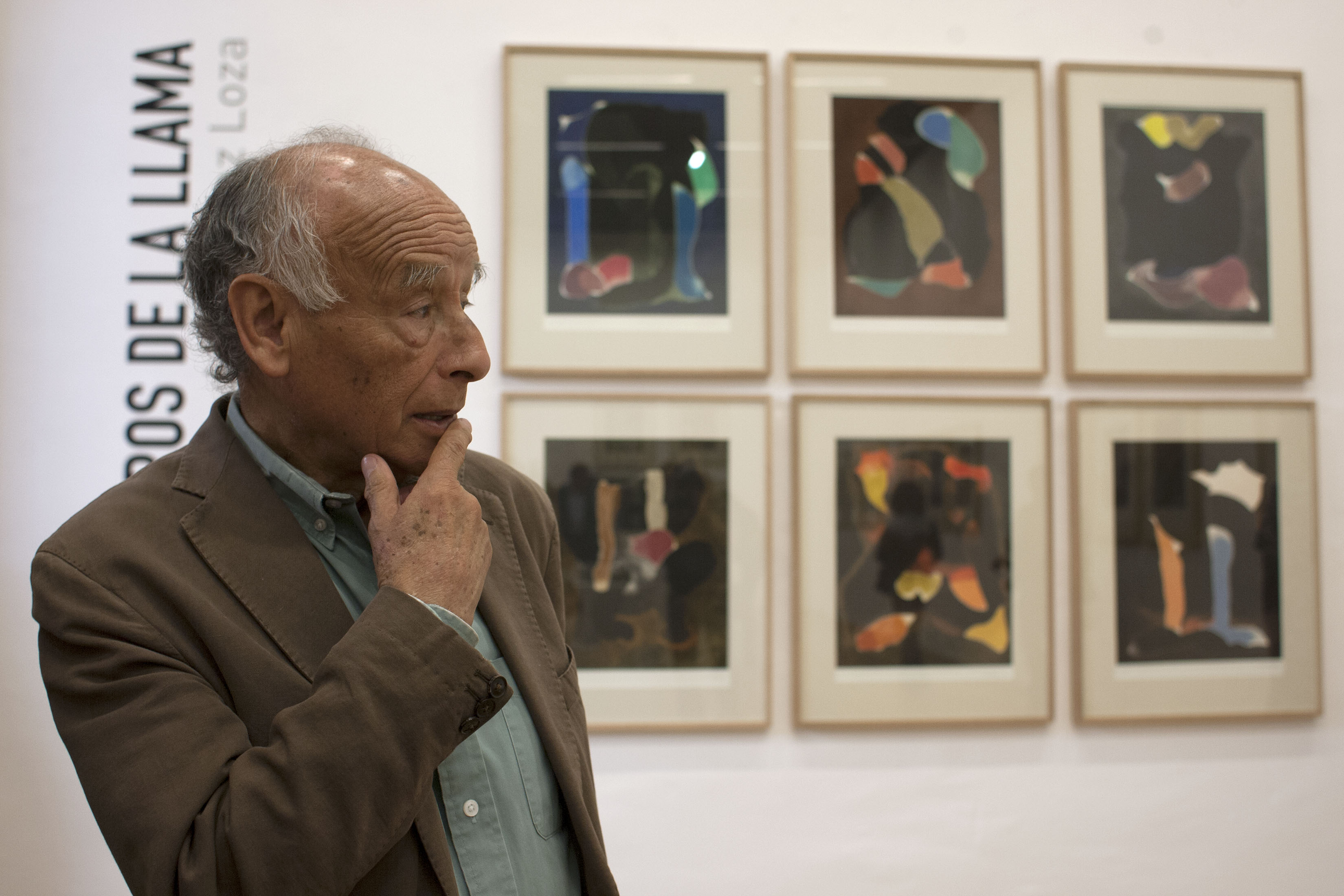 Martes, 17 de Marzo 2015. Recorrido para medios y conferencia de prensa por las exposiciones Cuerpos habitados, de María Eugenia Chellet; Sursum corda o la última canción, de Guillermo Arreola; Arrabales de una vida, retrospectiva de Guillermo Scully, y Rostros de la llama, obra gráfica de Luis López Loza (en imagen), en la que participo también el Director del Museo de la Ciudad de México, José María Espinasa y los curadores Antonio Cortes y Francesca Gargallo. Foto: Antonio Nava / Secretaría de Cultura CDMX.